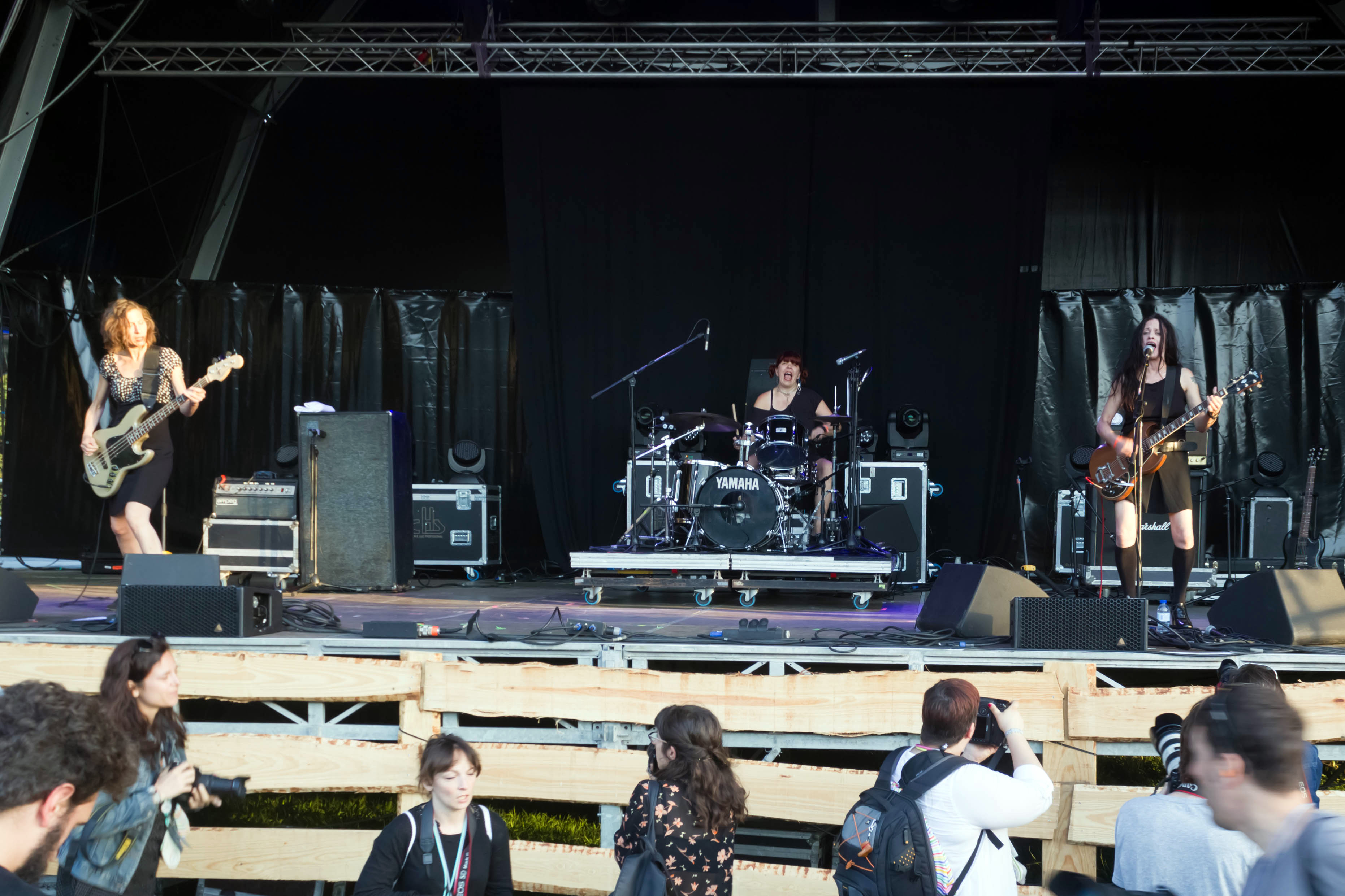 A banda estadounidense Babes in Toyland no NOS Primavera Sound 2015 de Porto.